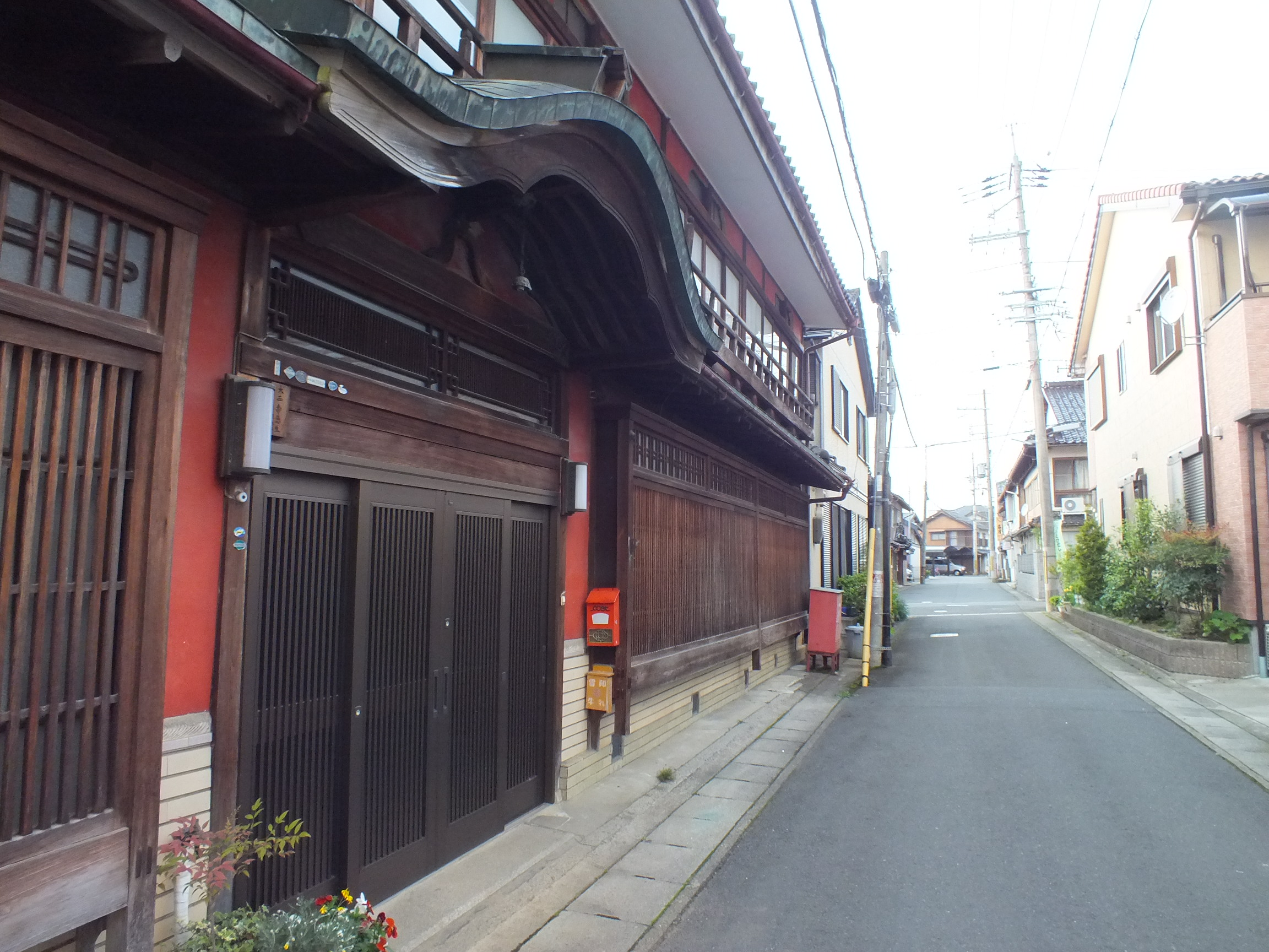 Izaki Yukaku-Fukuchiyama,Kyoto 京都府福知山市 猪崎遊郭跡